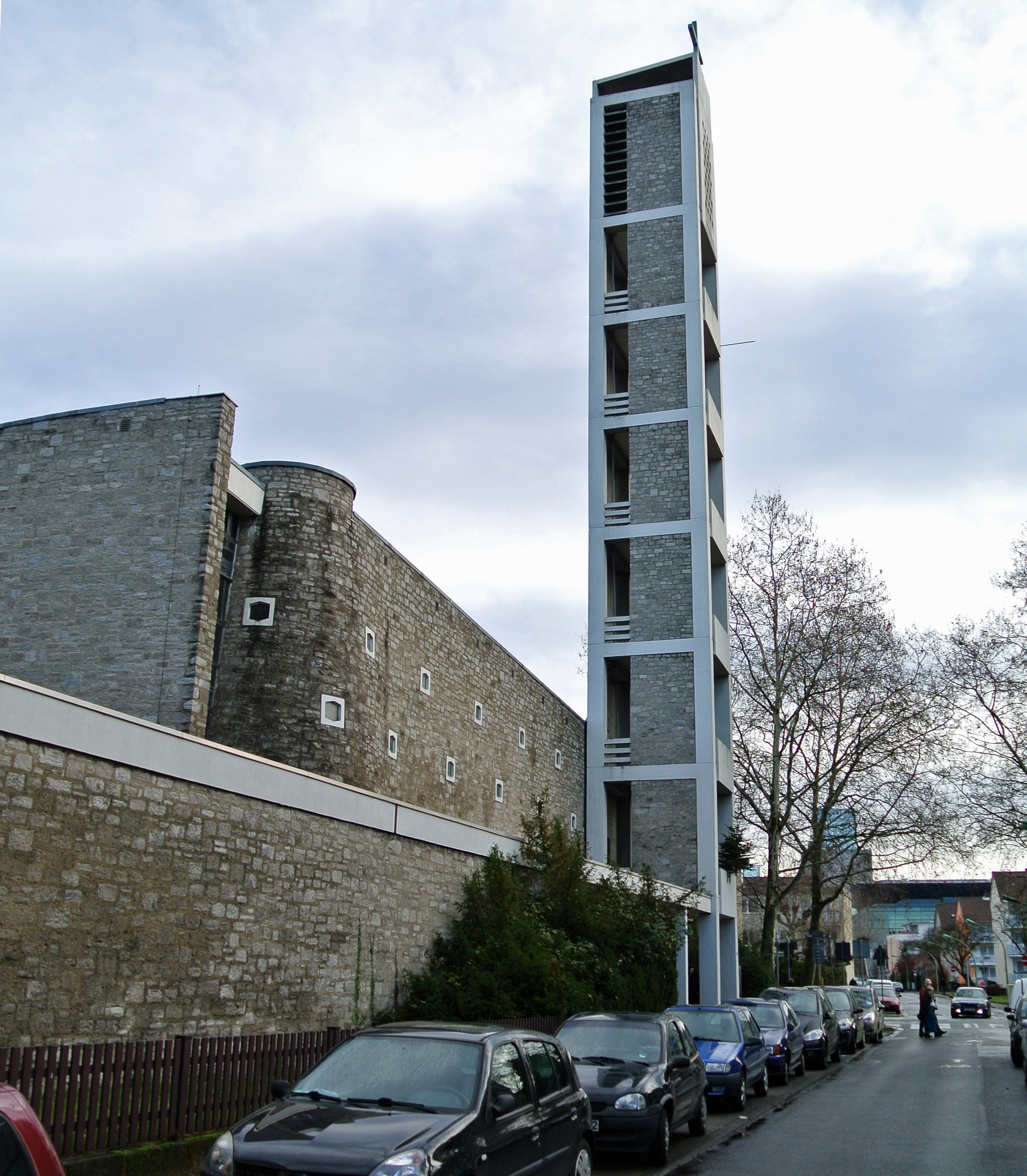 Dreifaltigkeitskirche in Frankfurt-Bockenheim-Kuhwaldsiedlung, Architekt: Werner Neumann, 1966 eingeweiht, Außenansicht